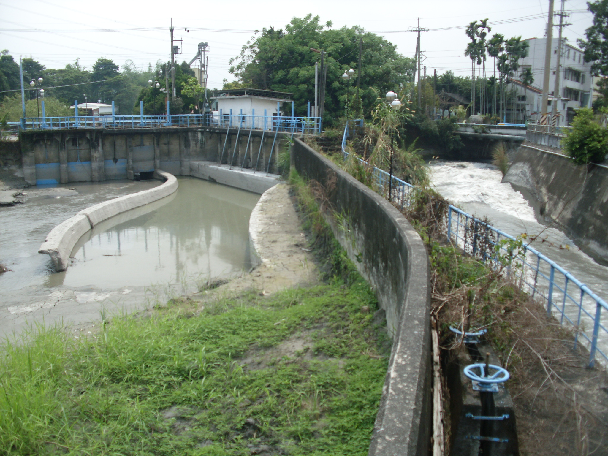 Bân-lâm-gú: 臺灣二水八堡圳，左手爿是引水道，正手爿是八堡圳，這馬八堡圳是換食對集集攔河堰來的水。